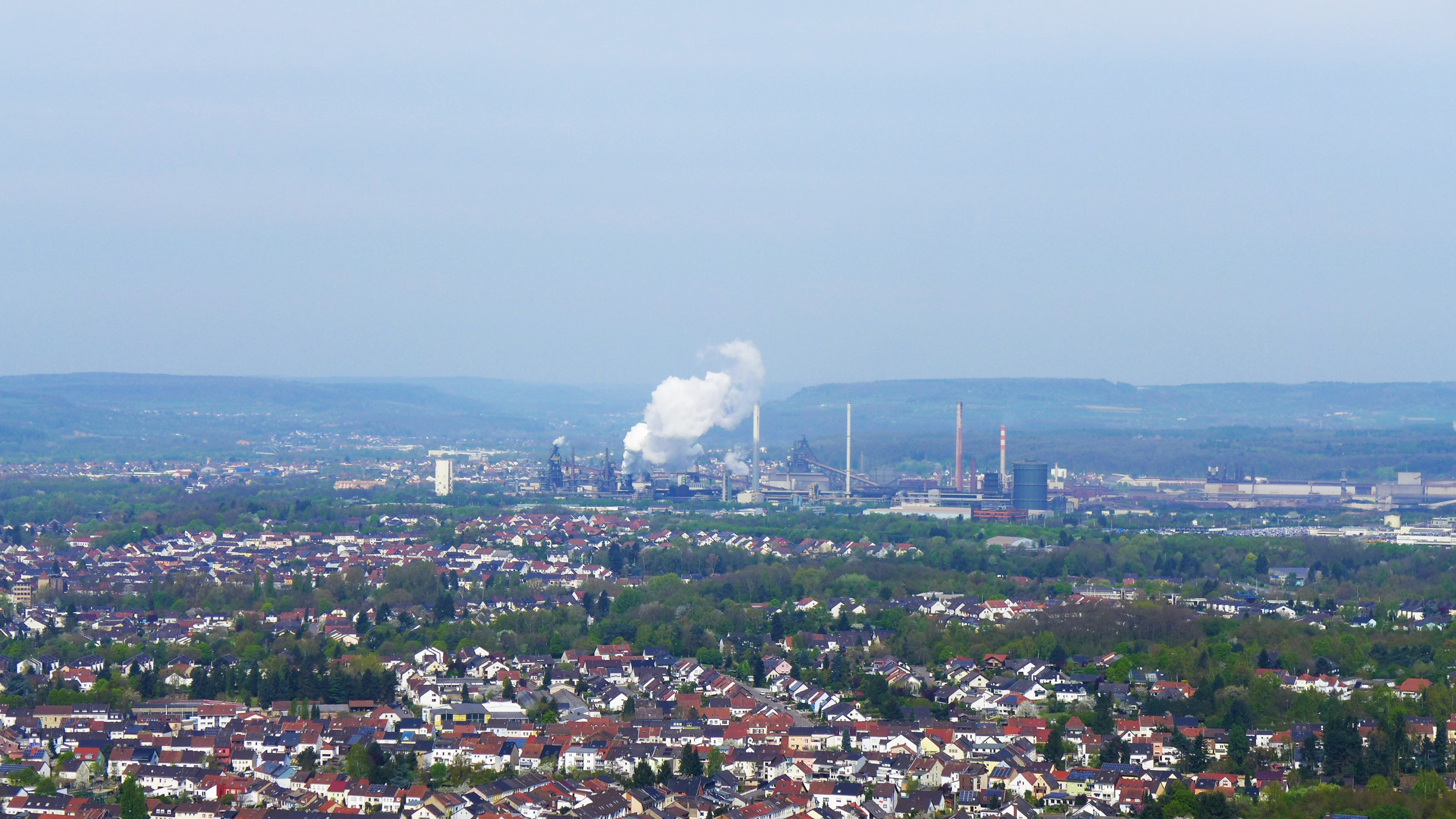 Ansicht der Dillinger Hütte vom Saarpolygon aus